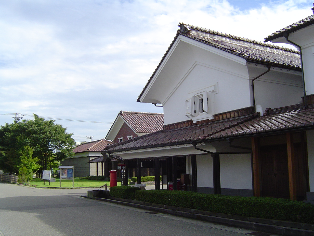 福島県喜多方市押切喜多方蔵の里